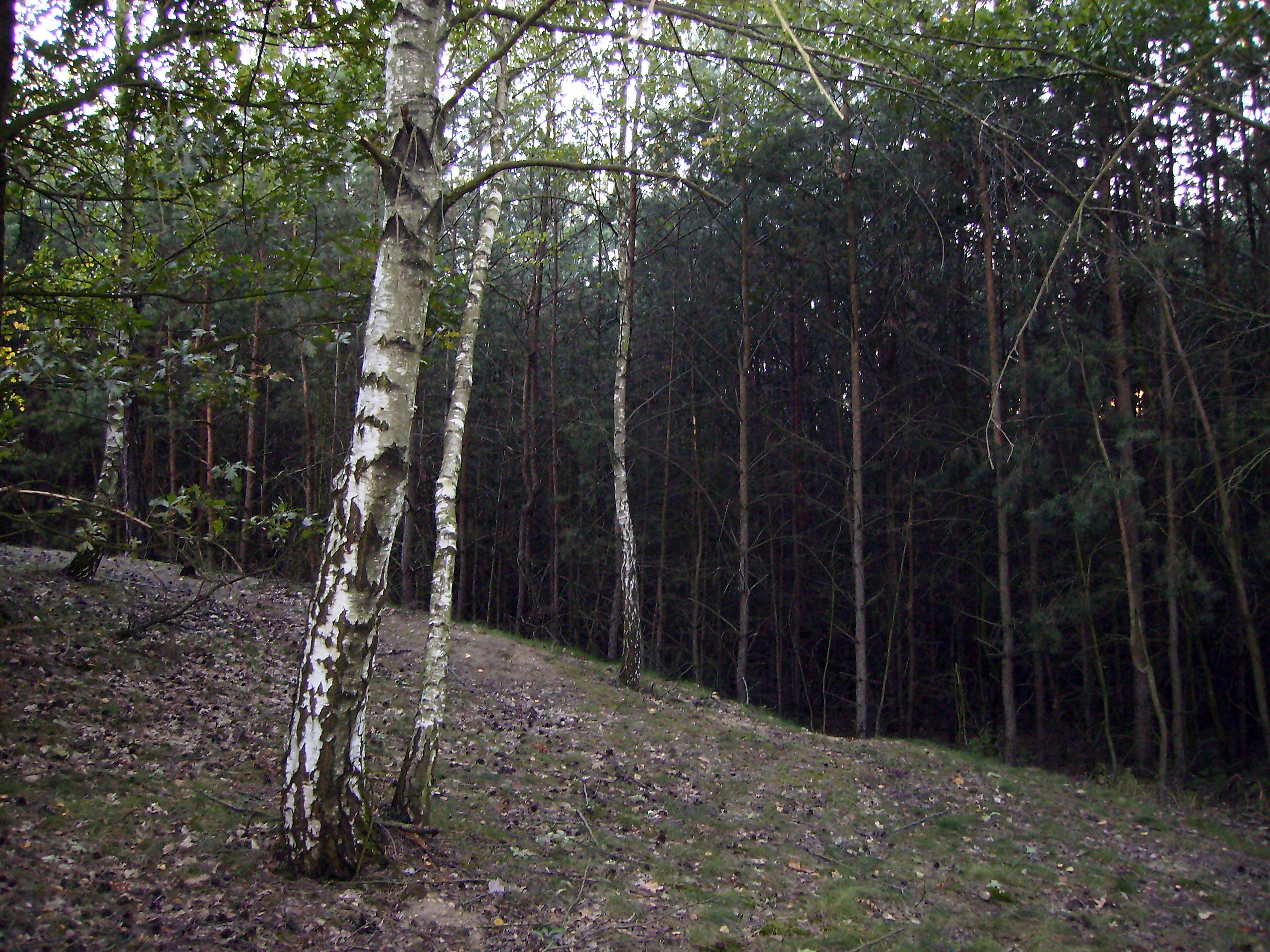 Borová monokultura v Borku nad středočeským Mochovem.